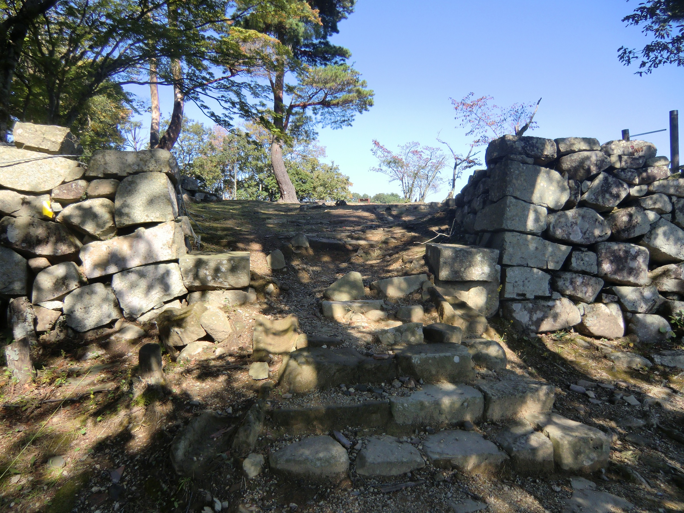 津和野城（津和野町）の出丸跡。別名は織部丸。